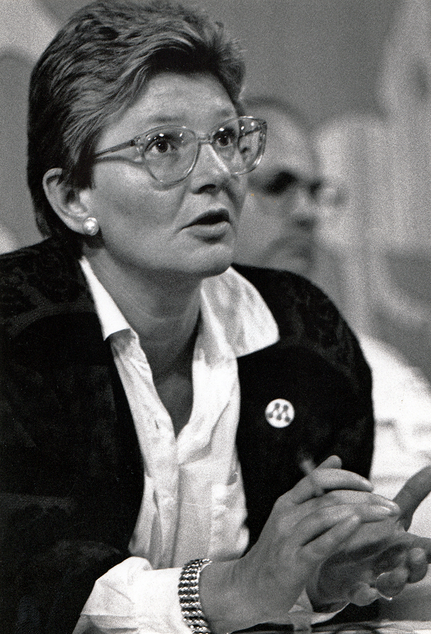 Inge Garstedt 1988.